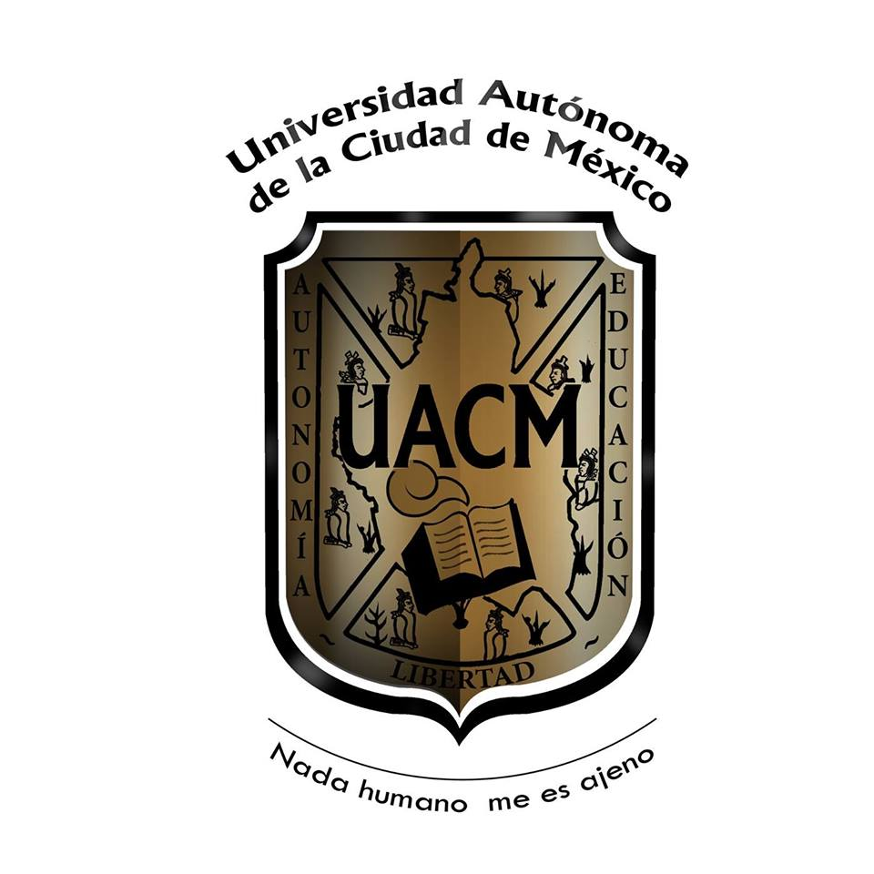 Diseñado para el concurso: “Diseño de Logotipo de la UACM”. de agosto / septiembre del 2010.